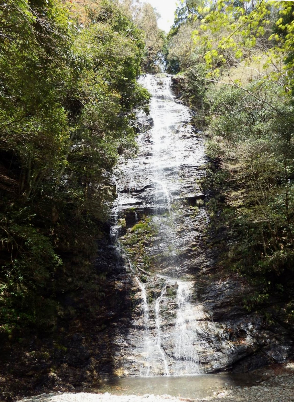 法皇トンネル脇にある水ヶ滝